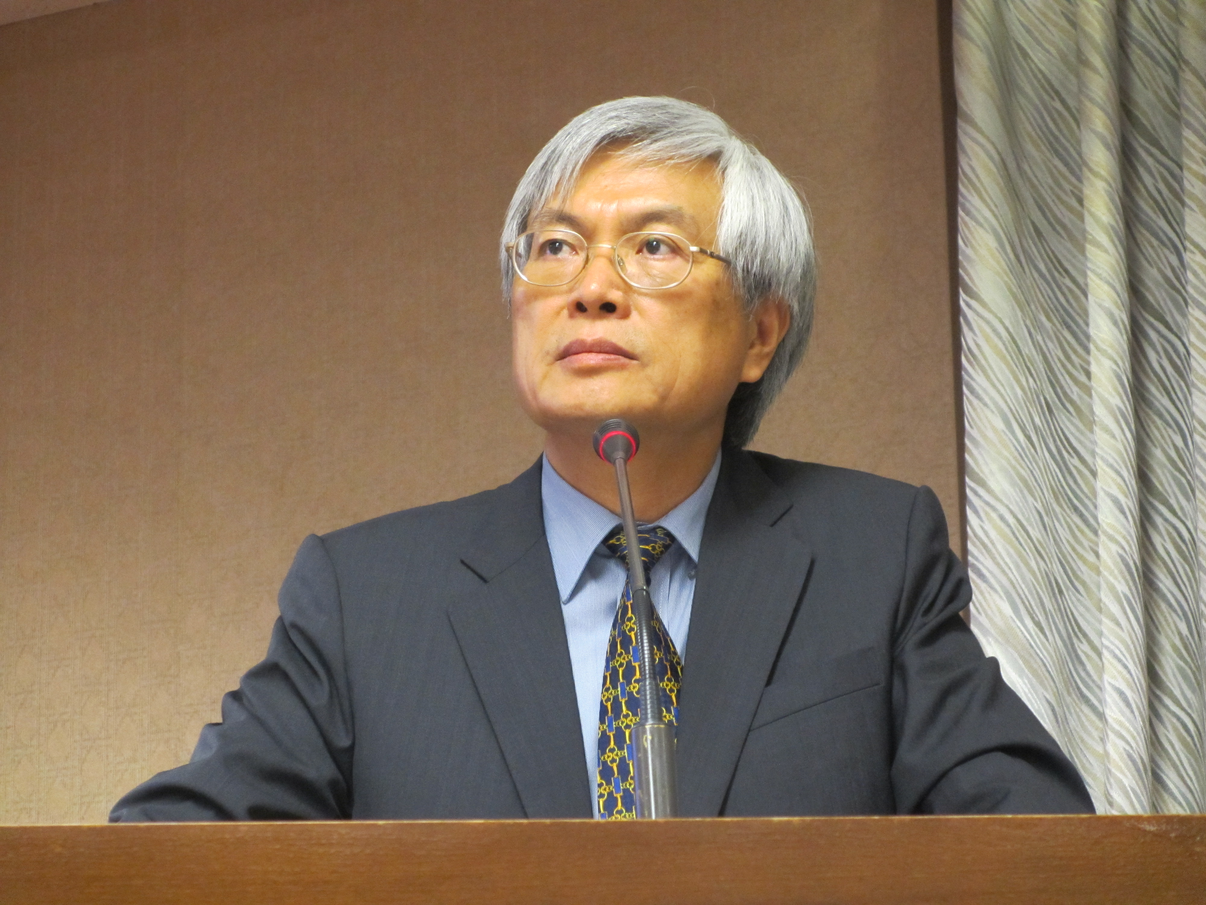 中文（台灣）: 台灣執政黨國民黨立委邱文彥(美國之音張永泰拍攝)